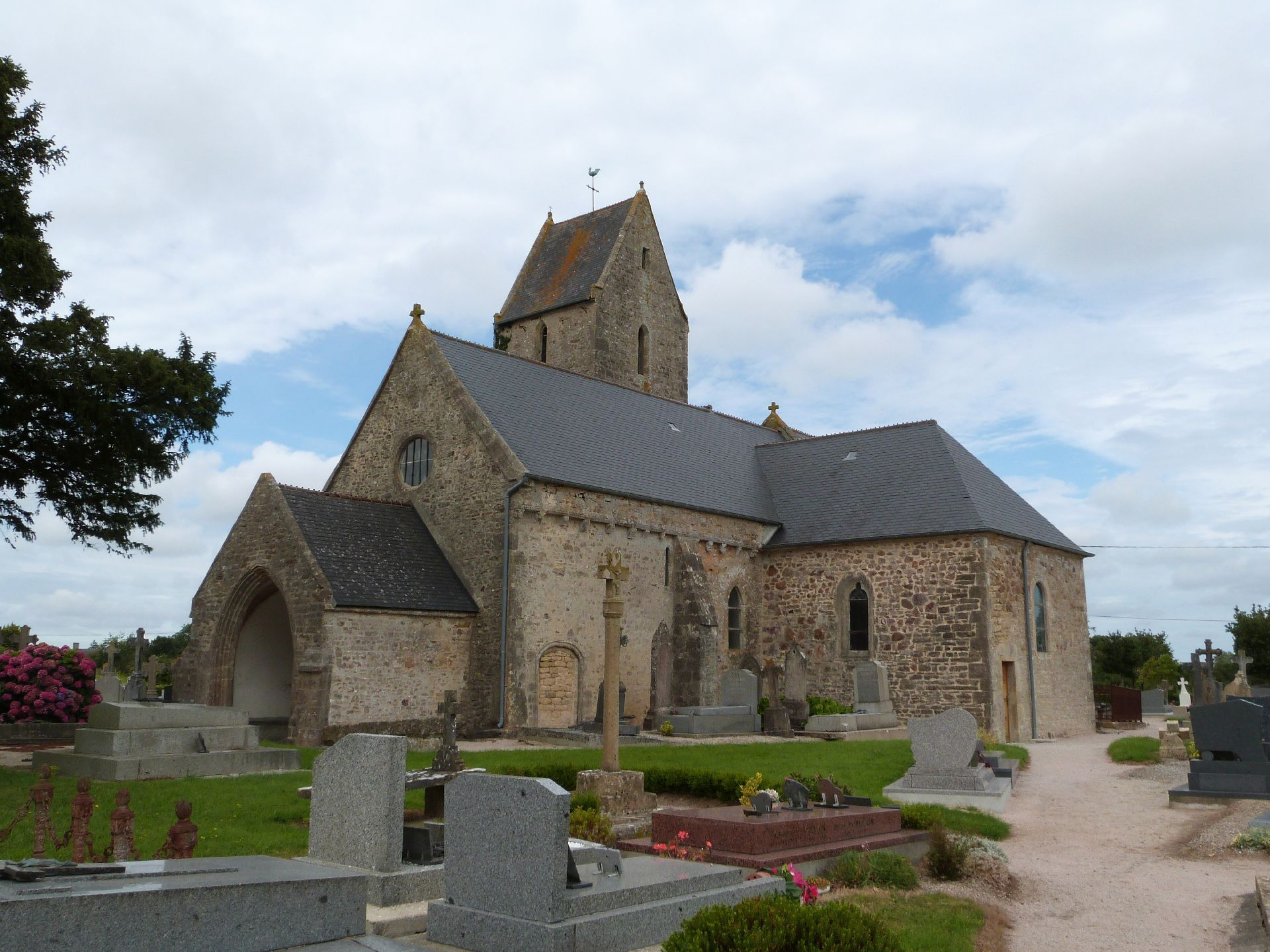 Église Saint-Pierre-ès-Liens d'Huberville, vue Sud-Ouest.